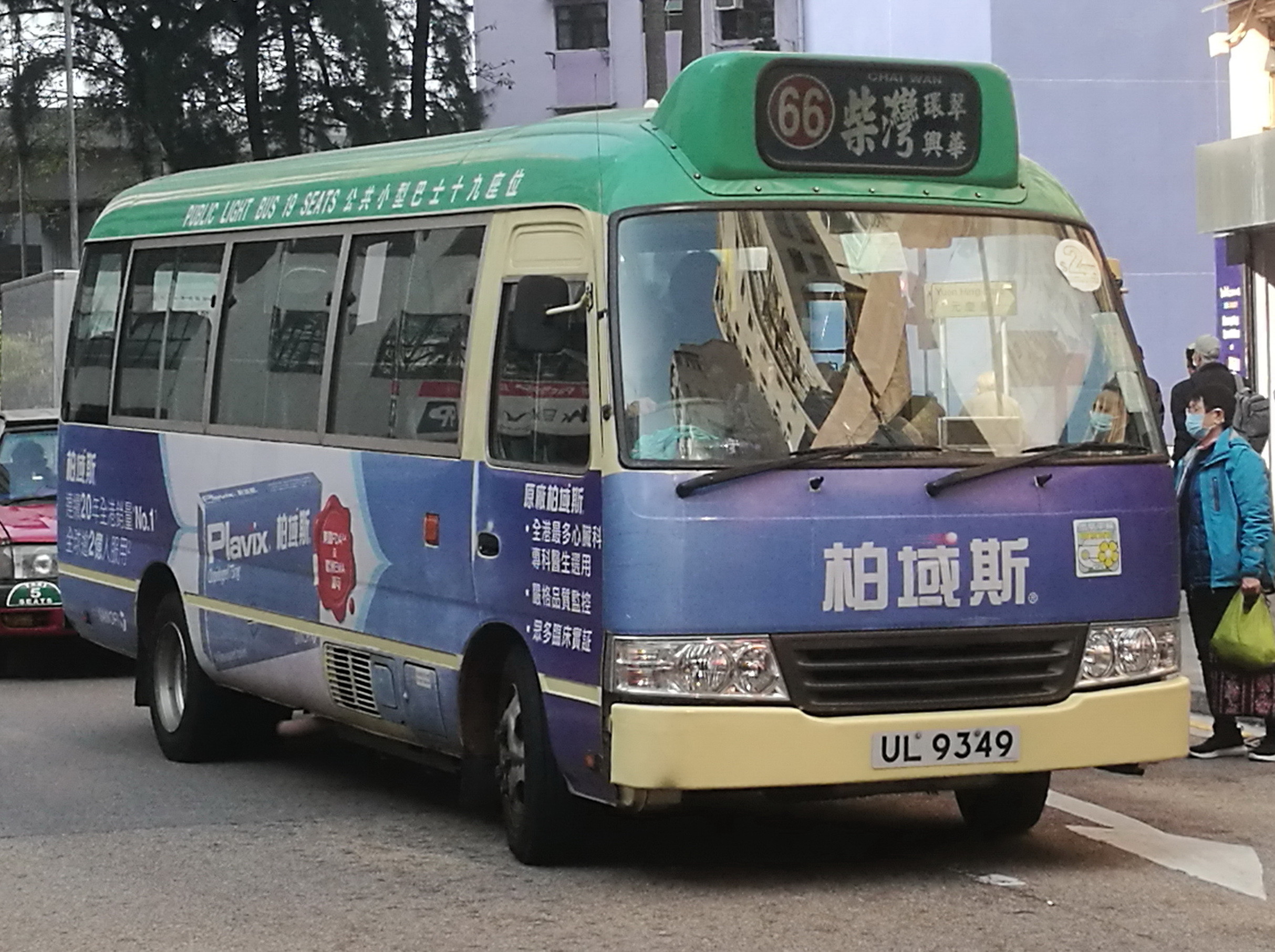 中文（中国大陆）: 小巴UL9349的照片